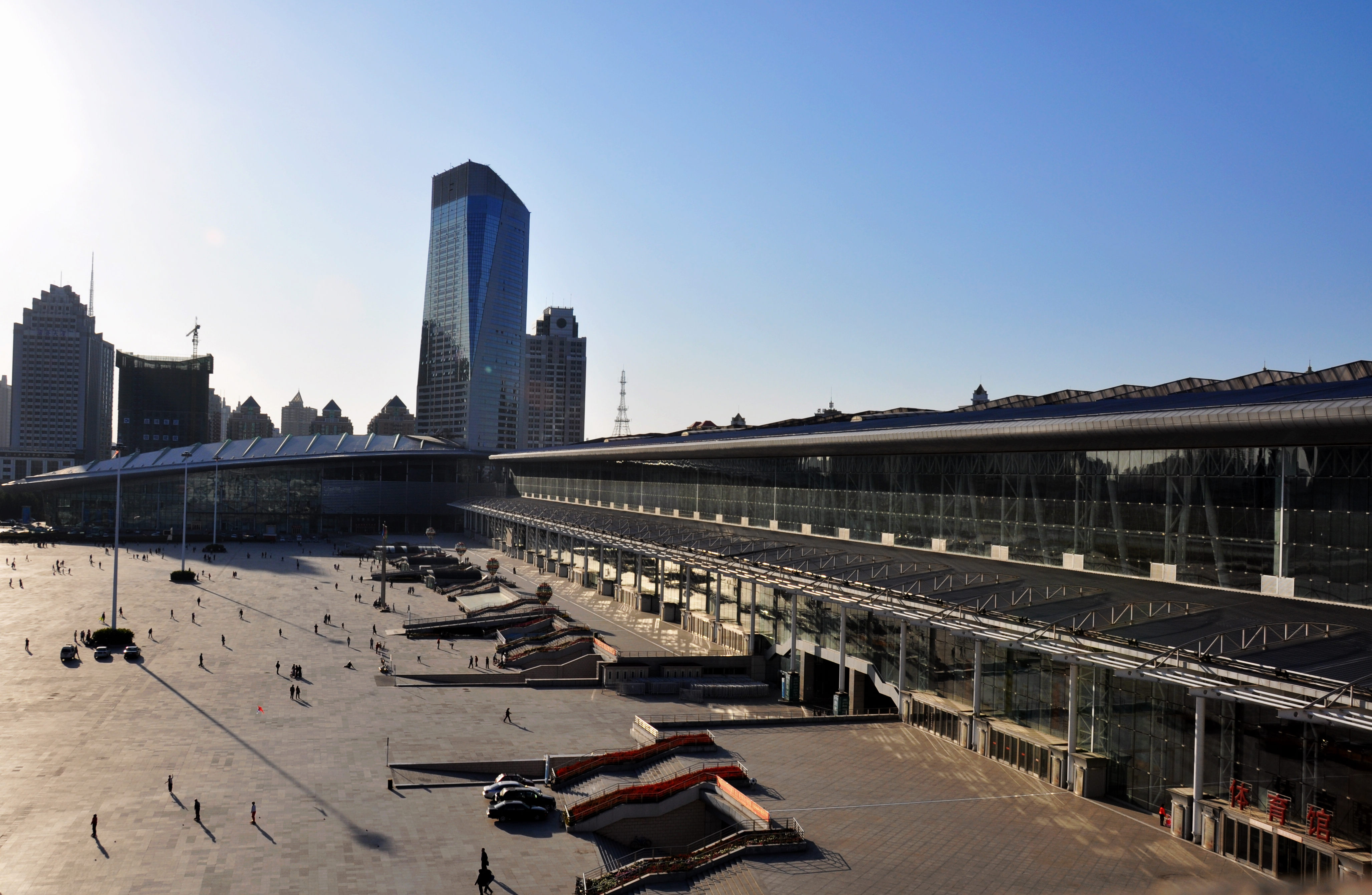 会展广场